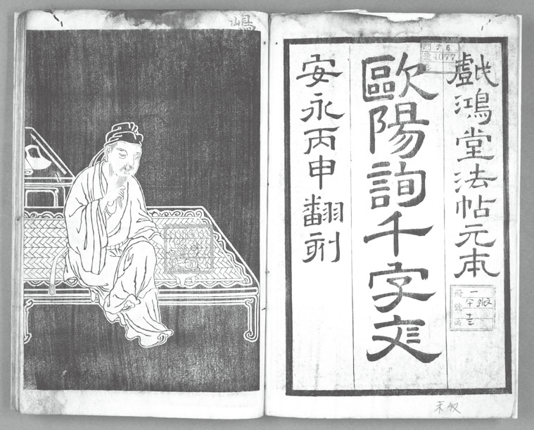 『欧陽詢千字文』（安永4年・1775刊）